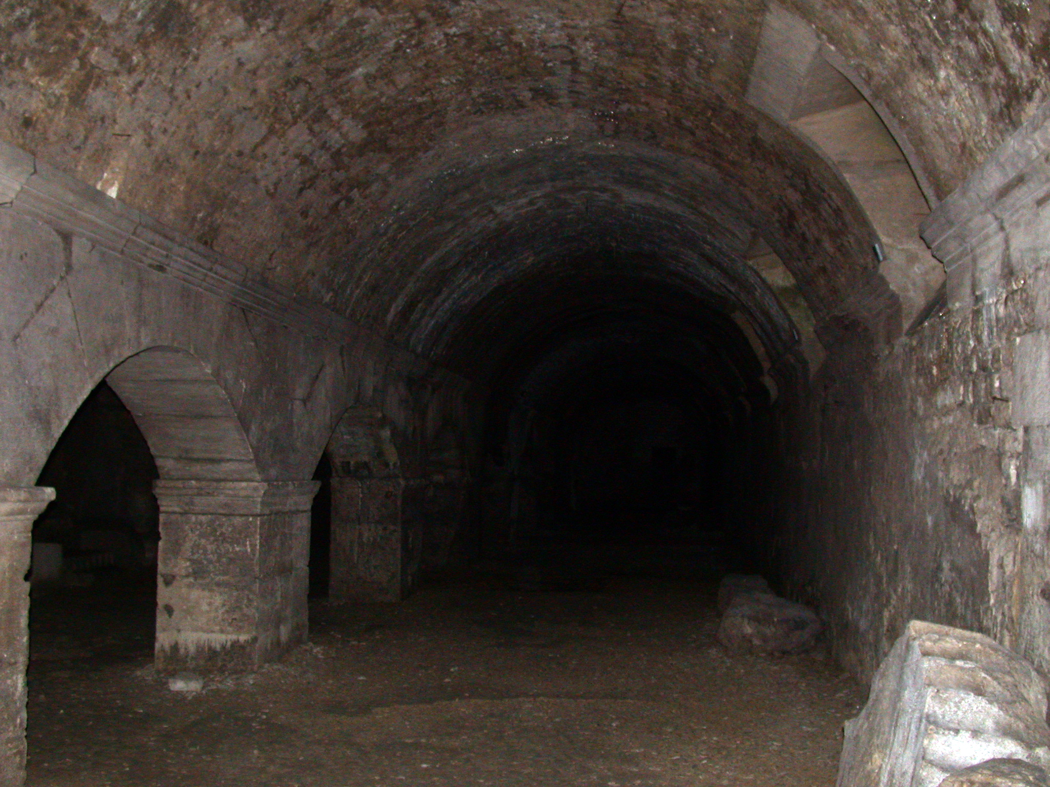 Arles (Francia), Foro romano, criptoportici, una delle gallerie. Foto personale aprile 2005